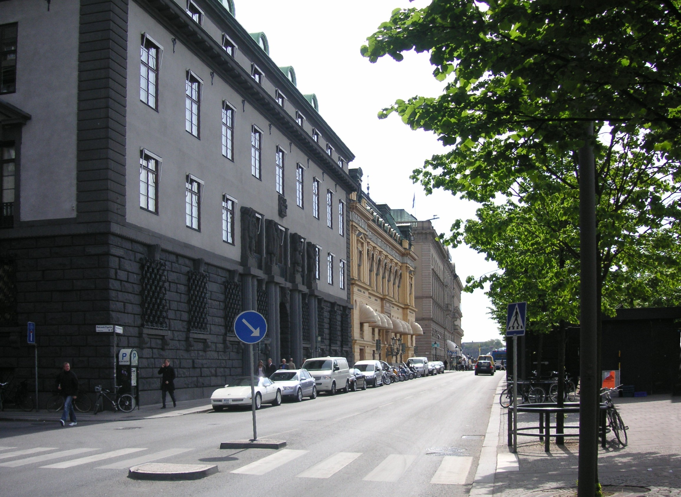 Kungsträdgårdsgatan in Stockholm. Kungträdgårdsgatan 8, built 1912-1915, Ivar Tengbom.